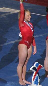 US National. Pódio do AA.